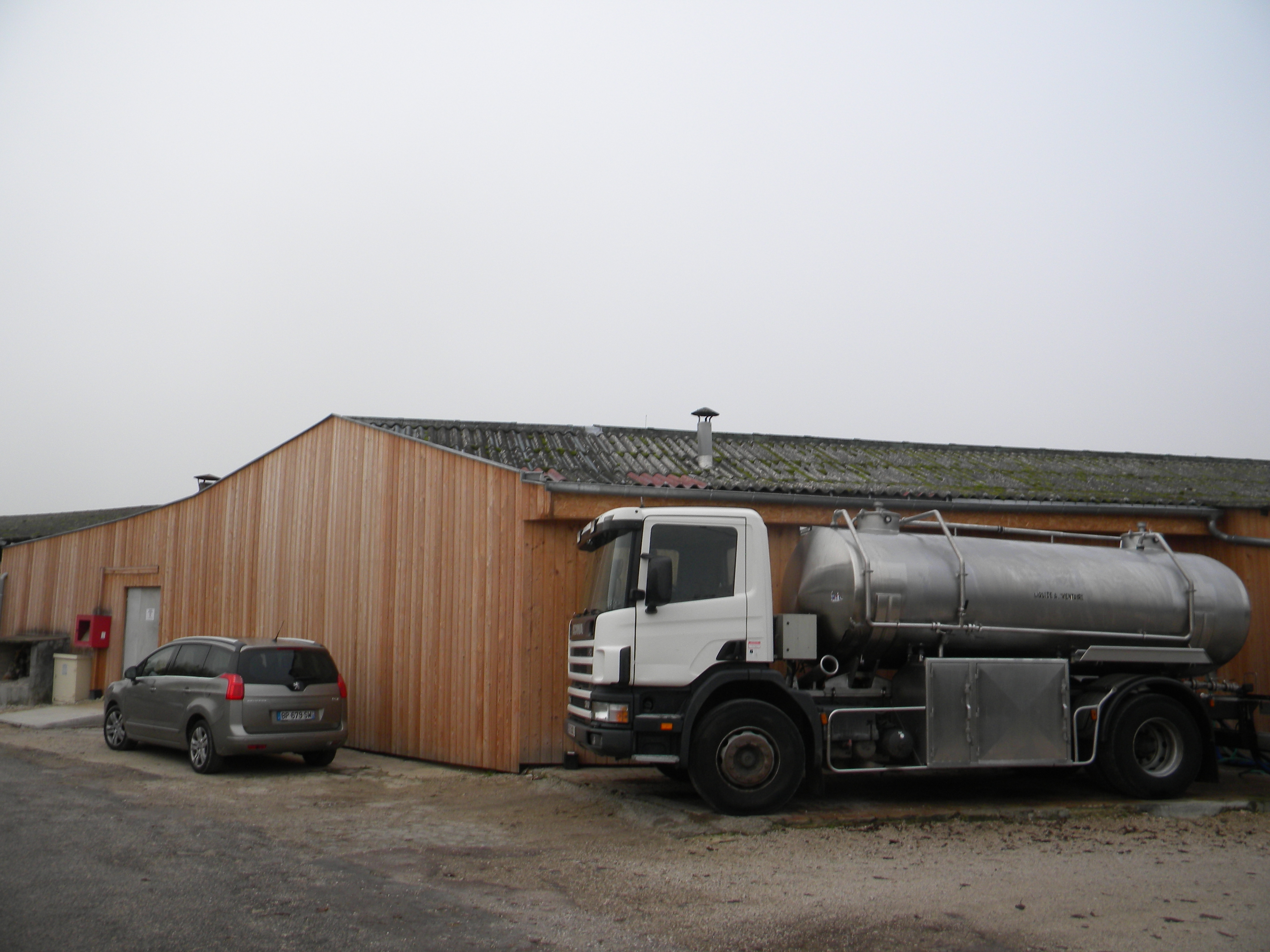 Fromagerie Delin Gilly-lès-Cîteaux